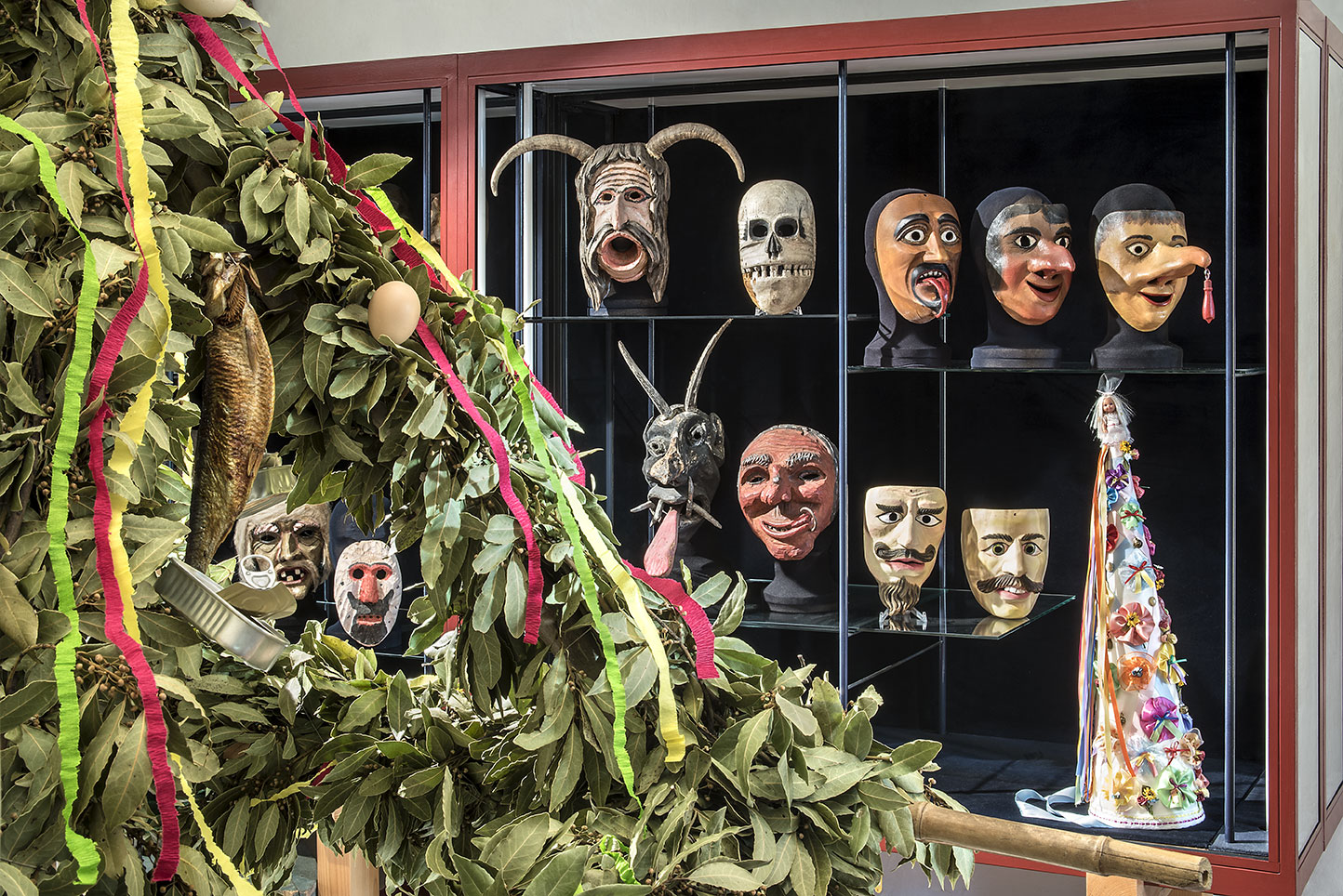 Particolare della sala dei riti dell'anno presso il Museo degli Usi e Costumi della Gente Trentina